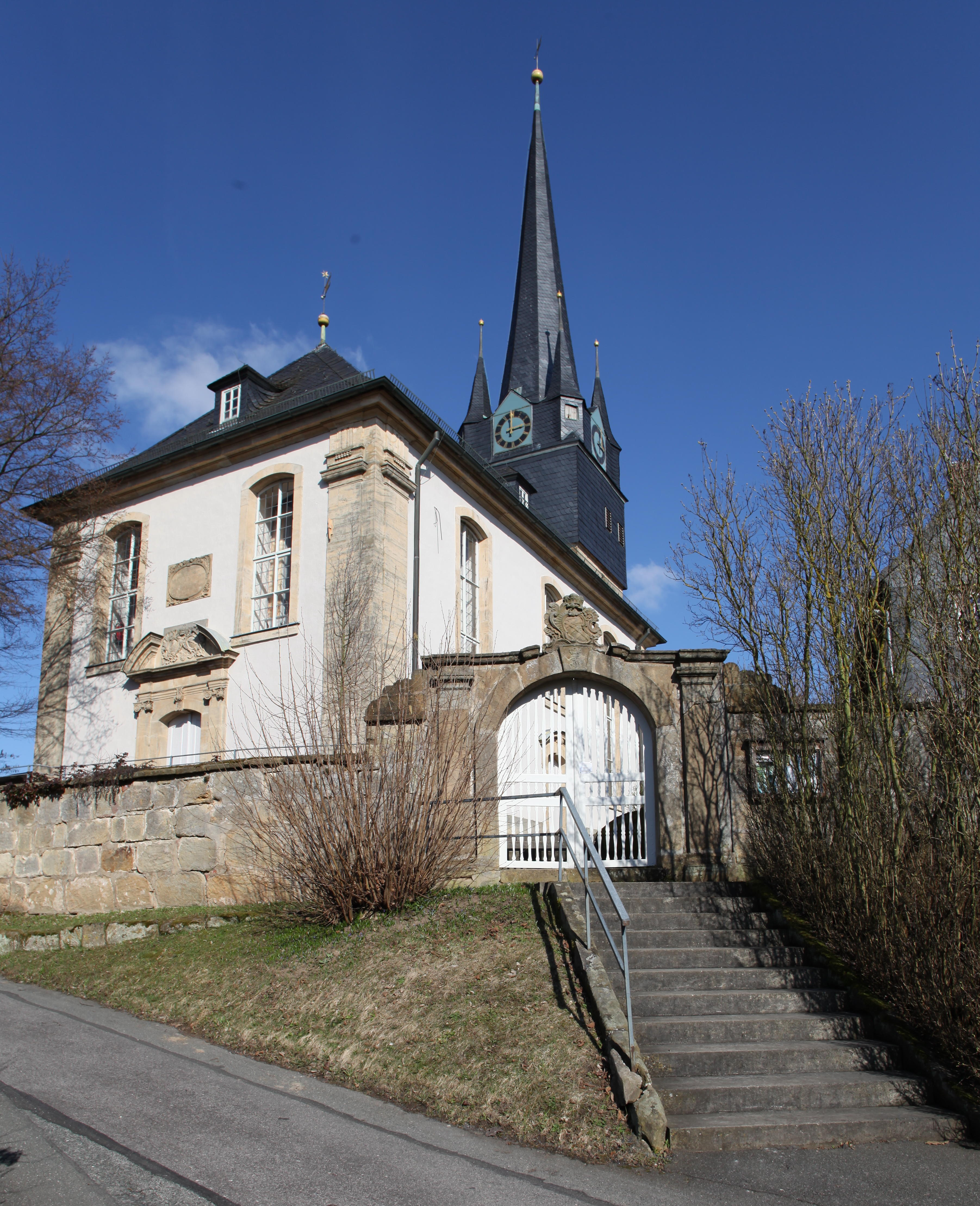 Evangelisch-Lutherische Kirche in Rossach, Landkreis Coburg